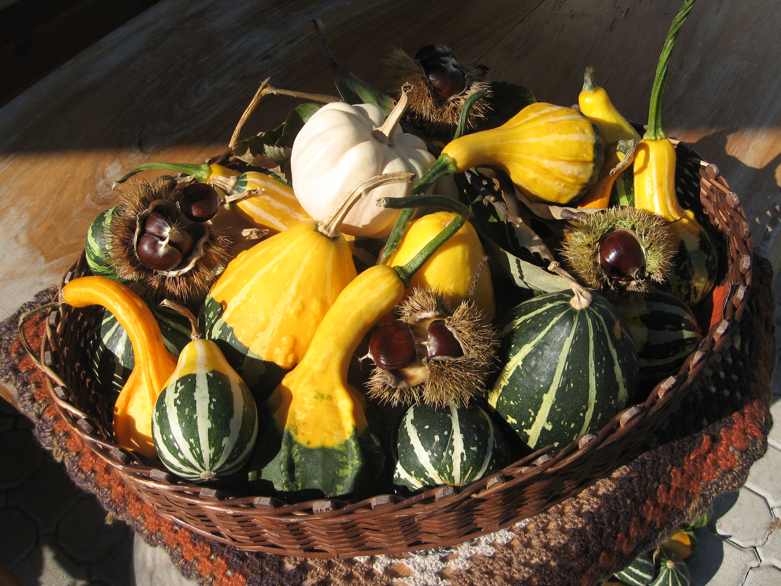 Autumn in Bela krajina